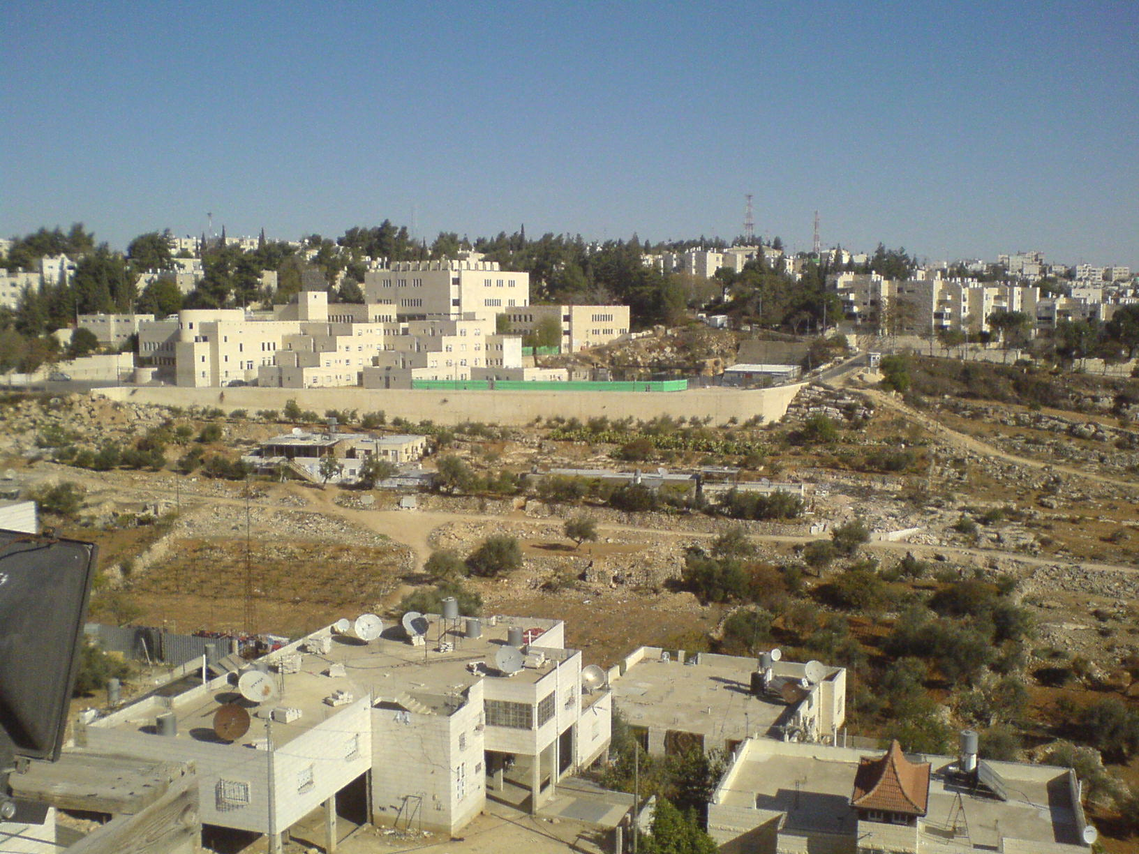 ישיבת ניר בקריית ארבע